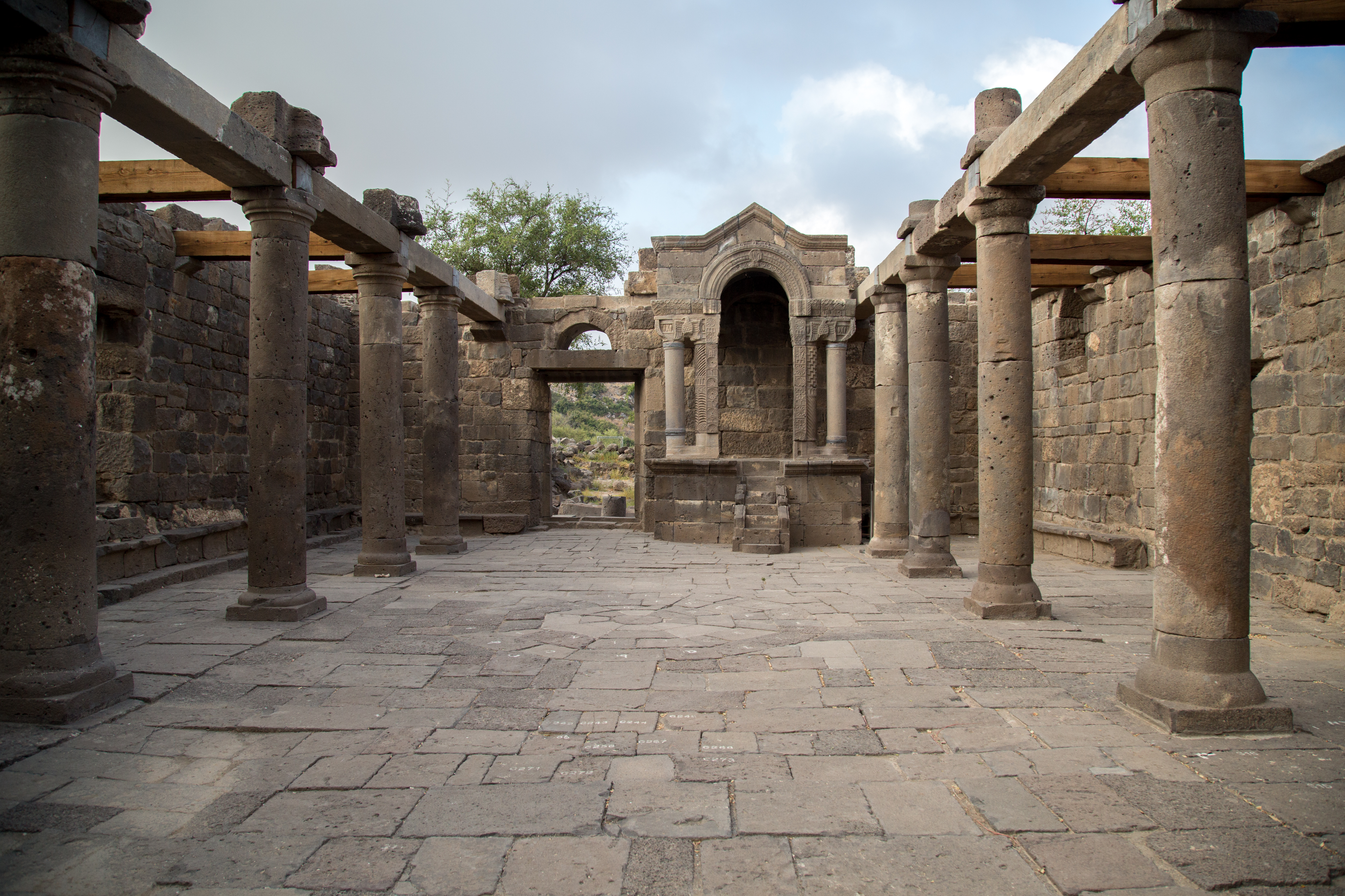 בית הכנסת העתיק באום אל-קנאטר הוא בית כנסת עתיק מתקופת המשנה והתלמוד שנחשף בדרום רמת הגולן באתר אום אל-קנאטר סמוך למושב נטור. בית הכנסת העתיק הוא מהמפוארים והחשובים מתקופה זו שנמצאו בארץ ישראל. האתר נקרא "קשתות רחבעם" על שם רחבעם זאבי שכיהן כשר התיירות כשאישר את תקציב החפירות בבית הכנסת ונרצח ימים ספורים לאחר מכן.